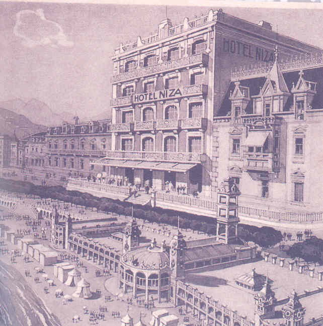 Hotela bista orokorra